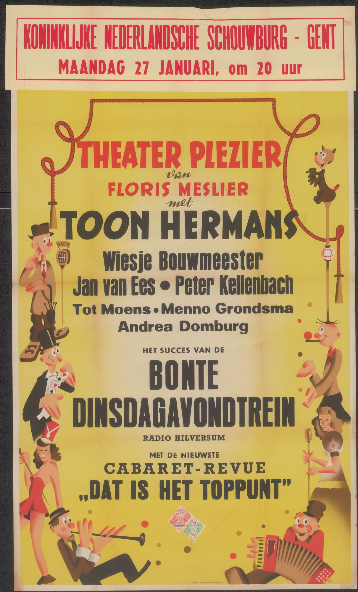 Theater plezier van Floris Meslier, met Toon Hermans, Wiesje Bouwmeester, Jan van Ees, Peter Kellenbach, Tot Moens, Menno Grondsma, Andrea Domburg. Het succes van de Bonte dinsdagavondtrein, Radio Hilversum, met de nieuwste cabaret-Revue, "Dat is het toppunt", Koninklijke Nederlandse Schouwburg, Gent, 27 januari 1947